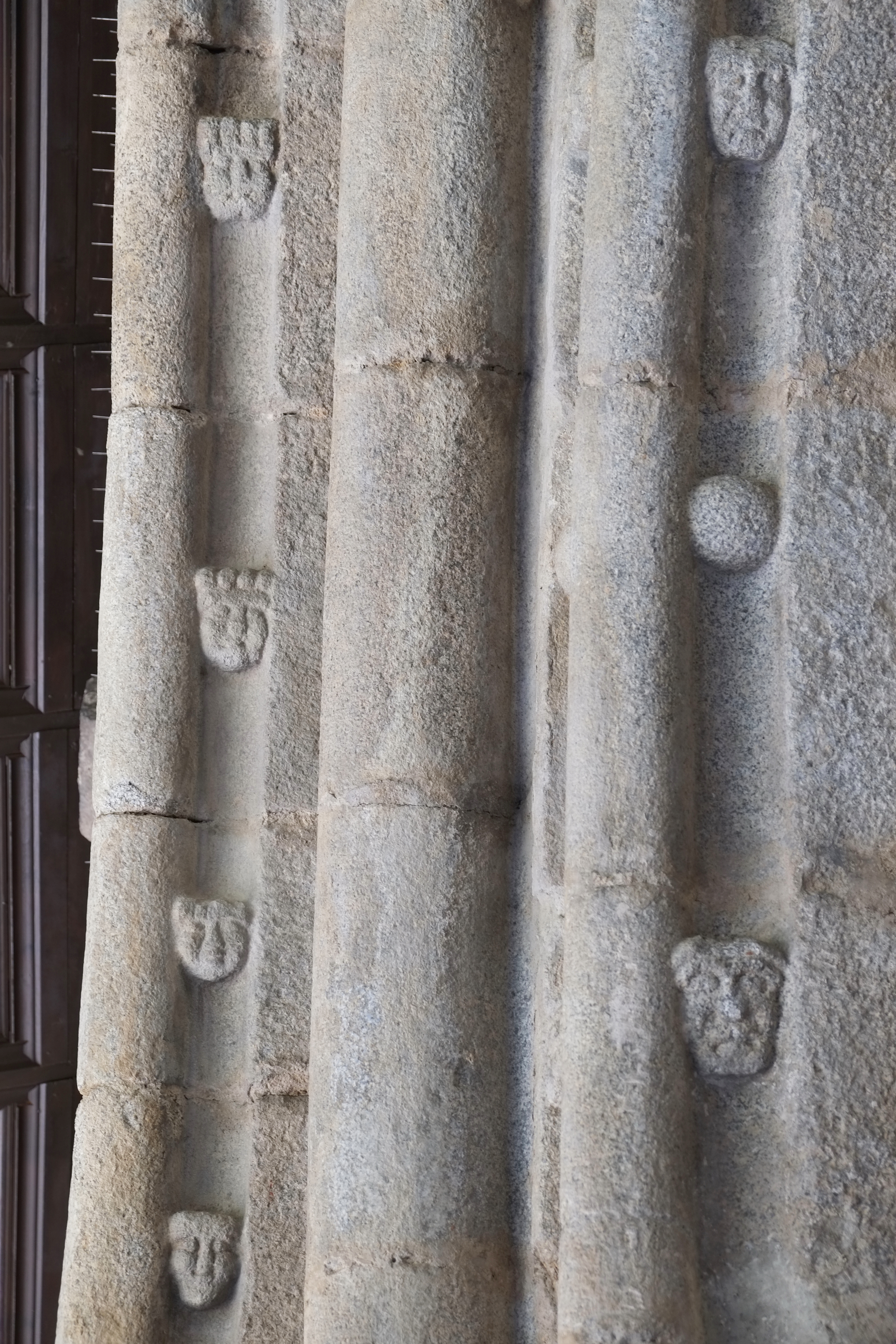 Kathedrale in La Seu d’Urgell in Katalonien (Spanien)